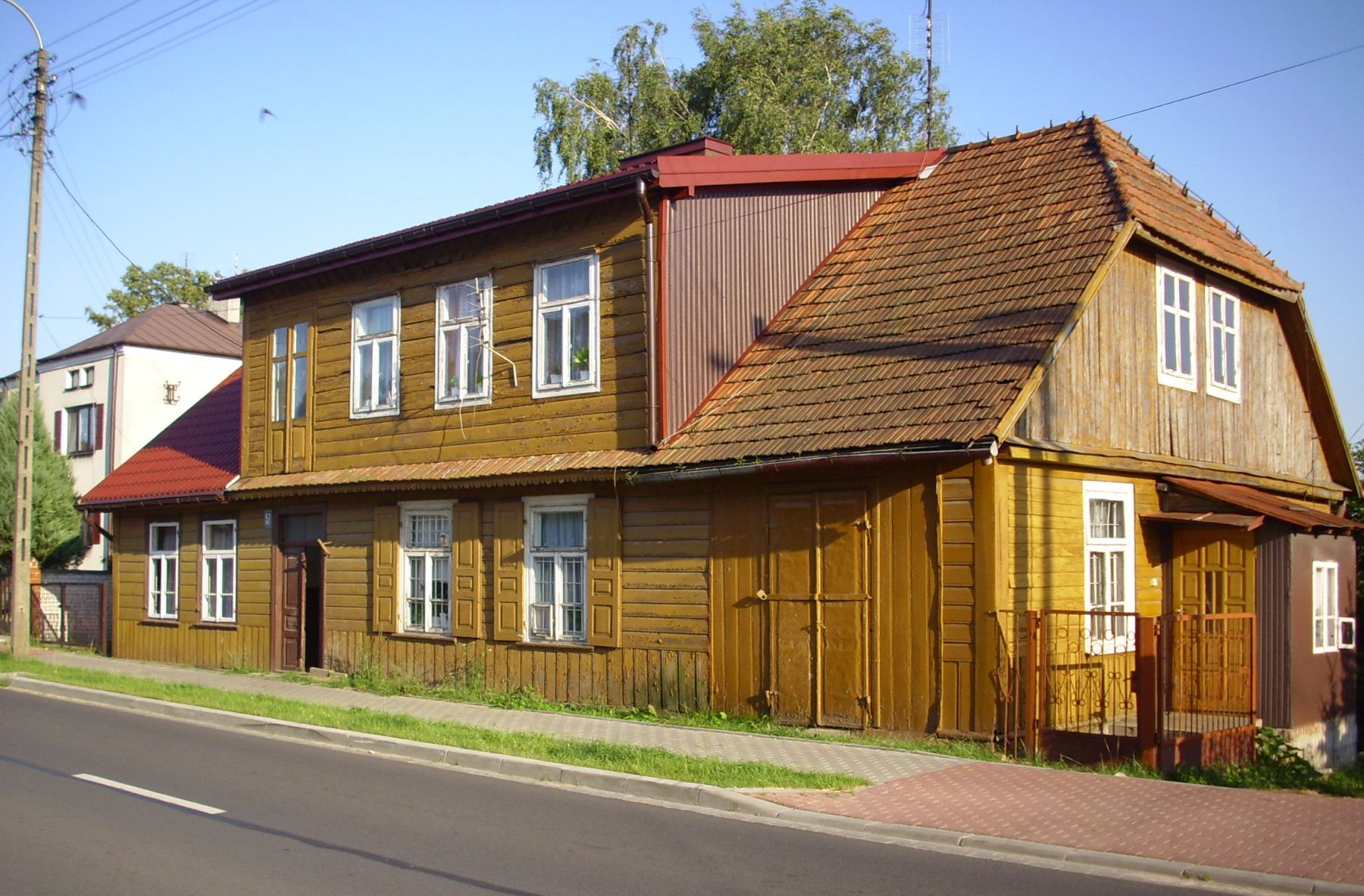 Latowicz (pow. miński, woj. mazowieckie, Polska). Stary dom przy ul. św. Ducha 57.